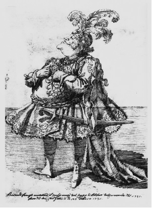 Caricatura del castrato Antonio Maria Bernacchi por Pier Leone Ghezzi